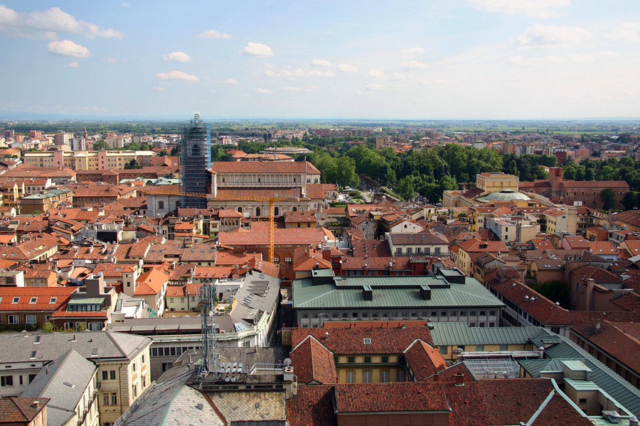 Panorama del centro di Novara dalla Cupola di San Gaudenzio